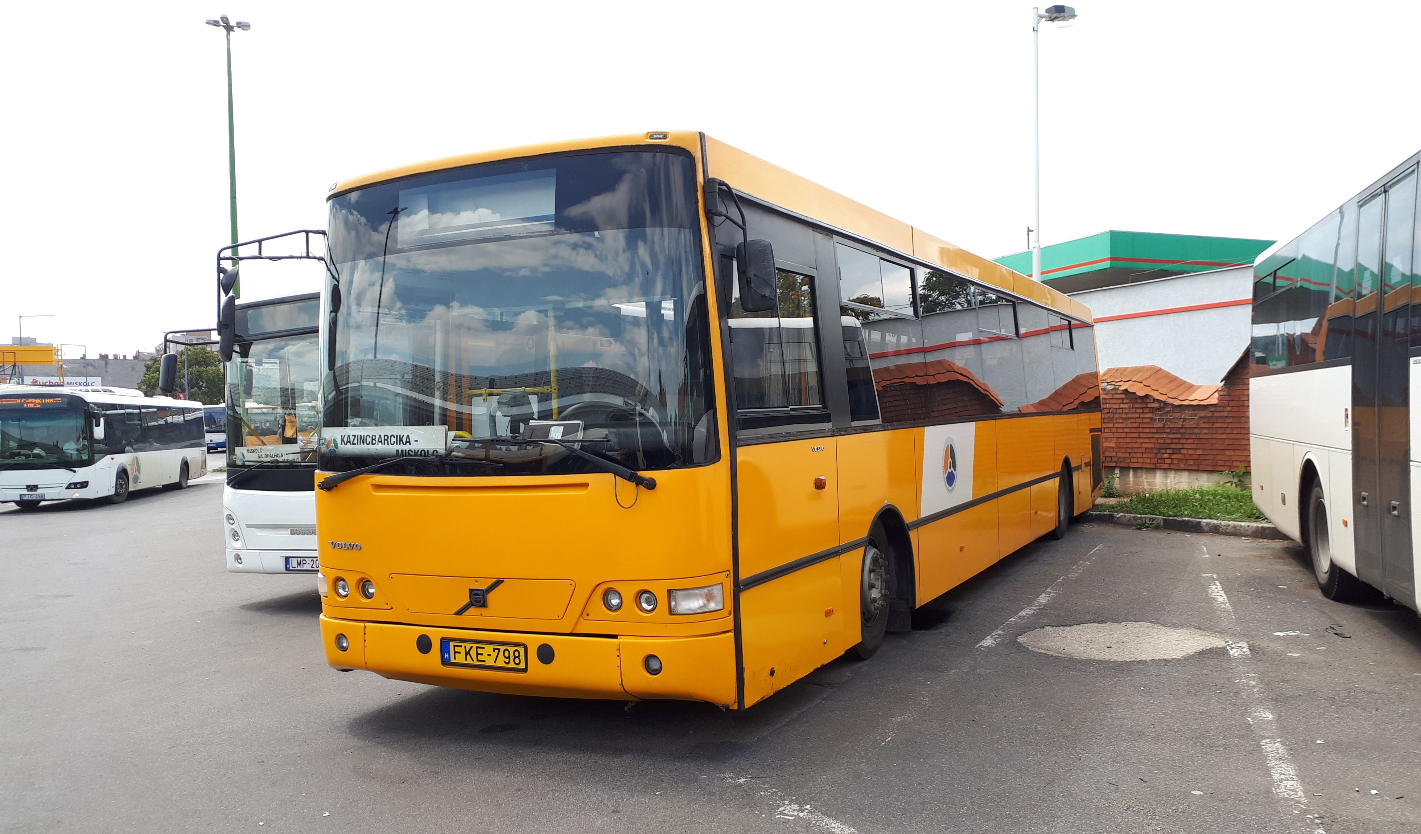 Az ÉMKK FKE-798 rendszámú Volvo Alfa Regio típusú busza Miskolcon, a 3765-öses helyközi járaton.